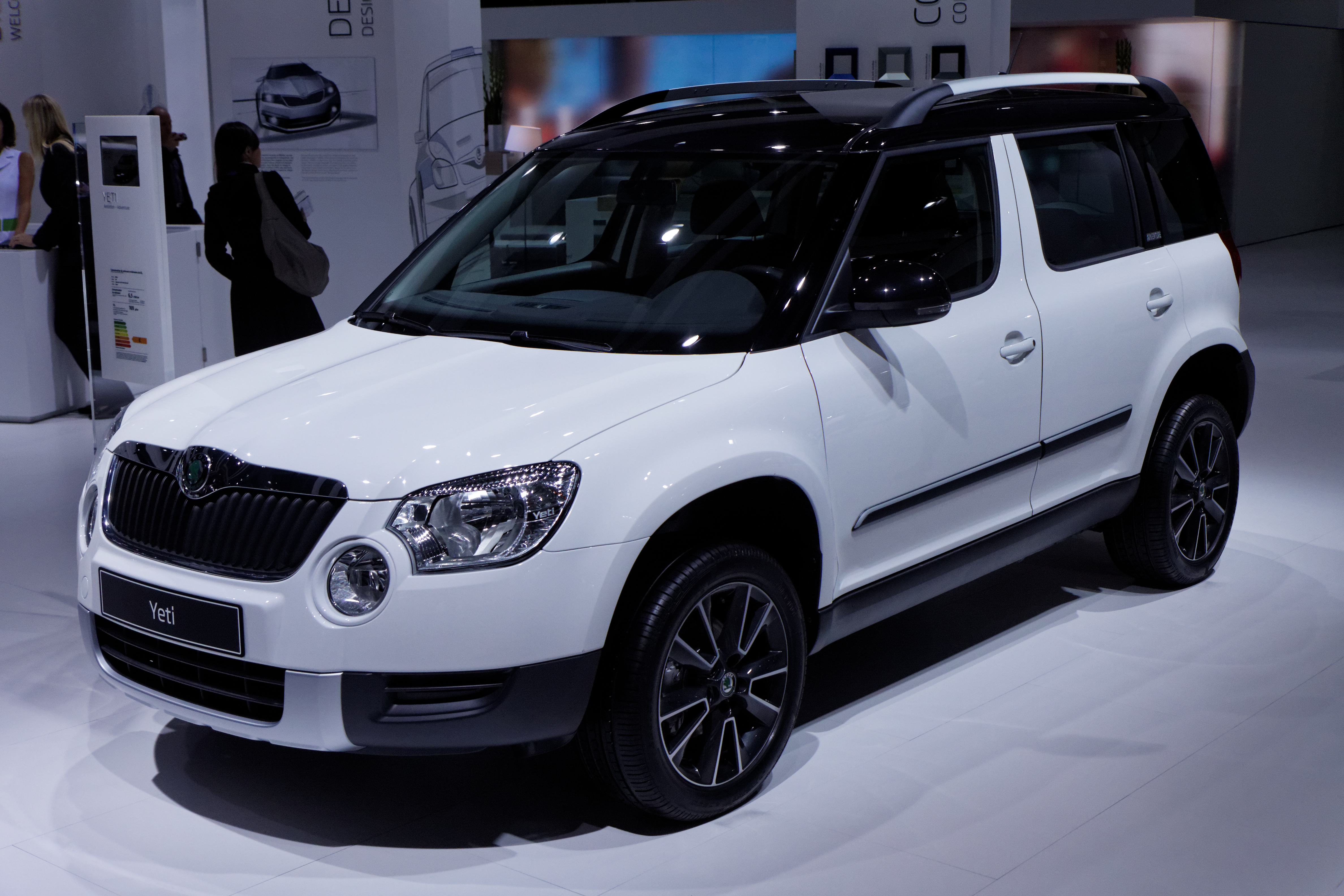 Une Skoda Yeti présentée lors du Mondial de l'Automobile de Paris 2012.